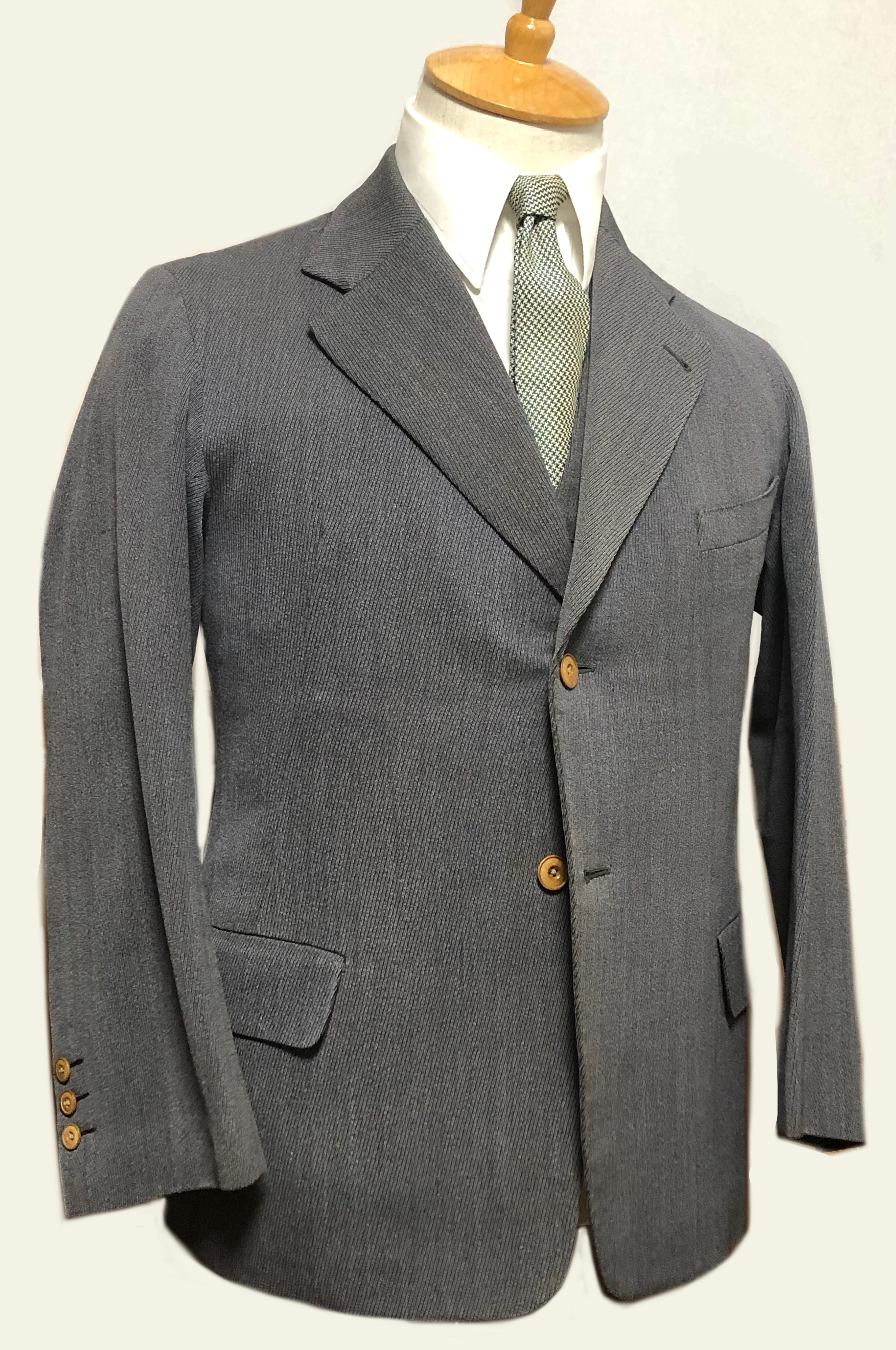 1930年代の背広